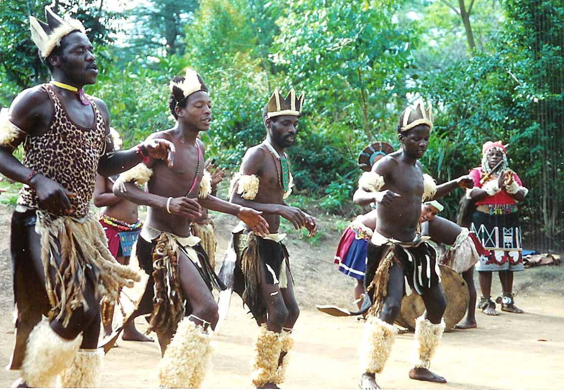 Zuludänzer 2